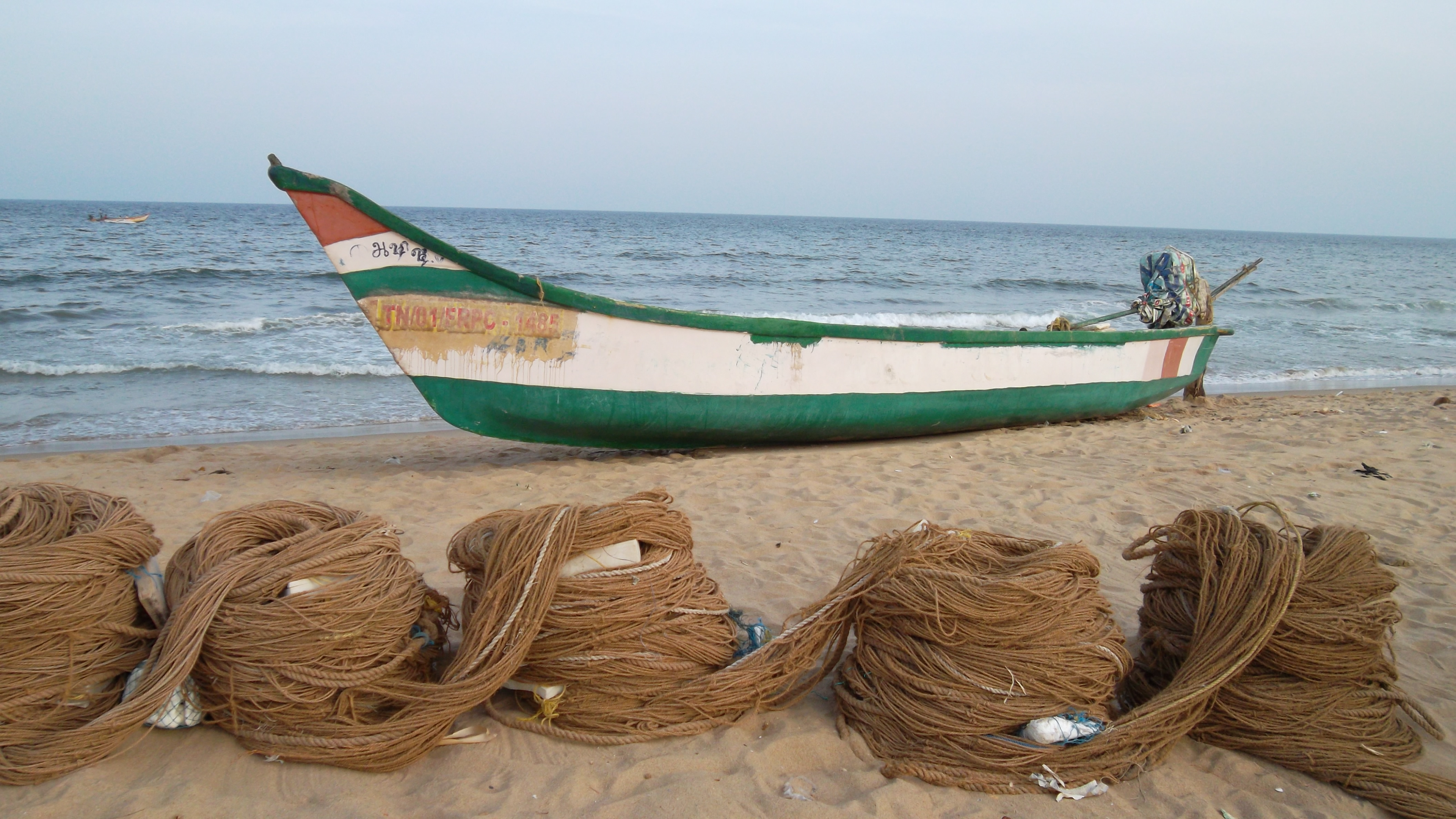 மீன்பிடிக்கு செல்ல காத்திருக்கும் படகு மெரினா கடற்கரை